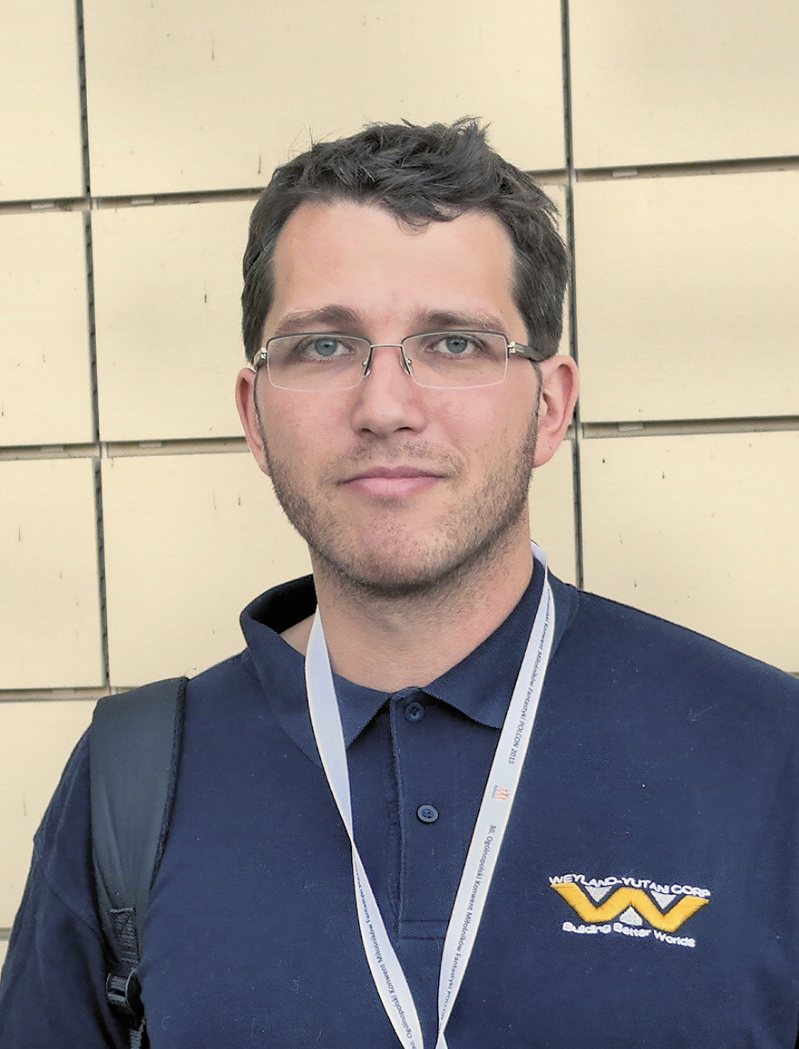 Pisarz Michał Cholewa, Polcon 2015 w Poznaniu